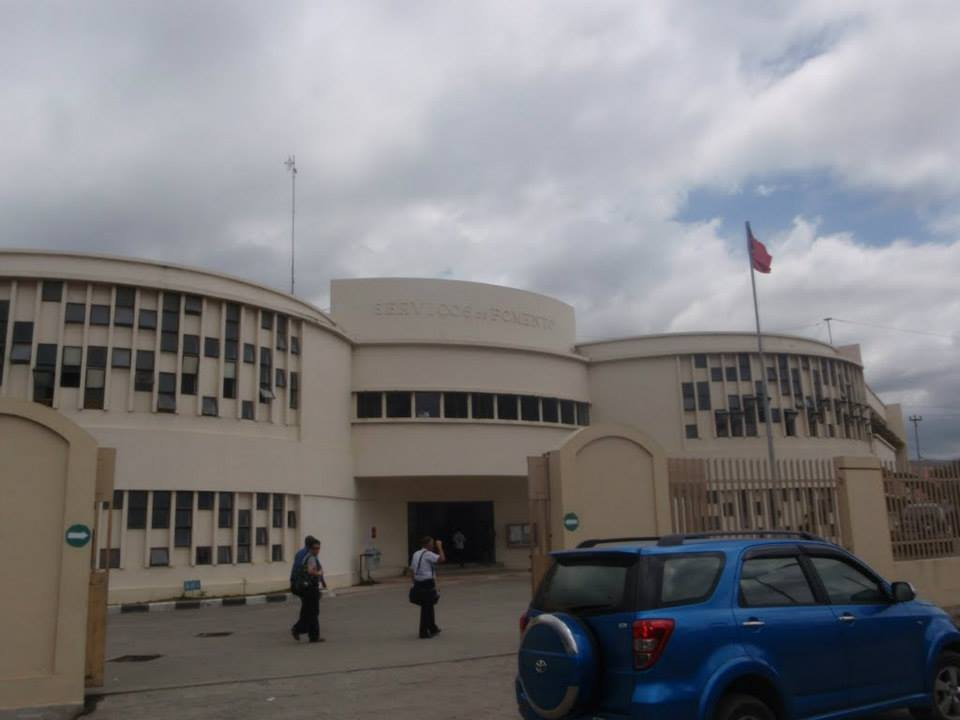 Dili